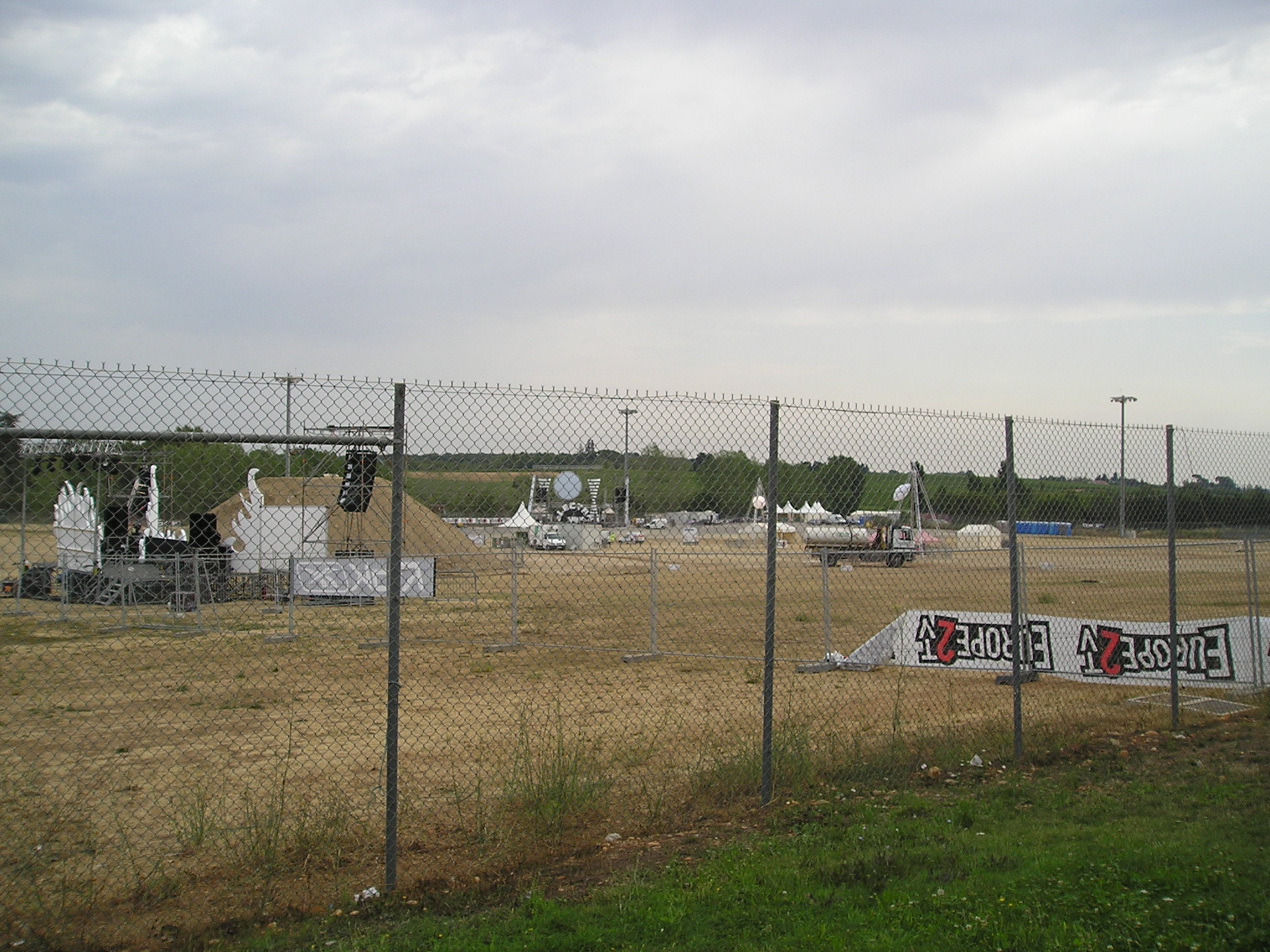 L'Espace Rock du domaine de Grammont de Montpellier en cours d'aménagement pour un concert en juillet 2006.